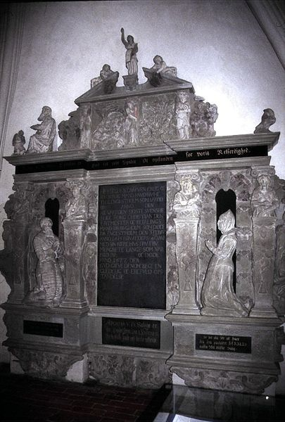 Nørup Kirke i Danmark. Epitafium For Knud Brahe og Margrethe Lange